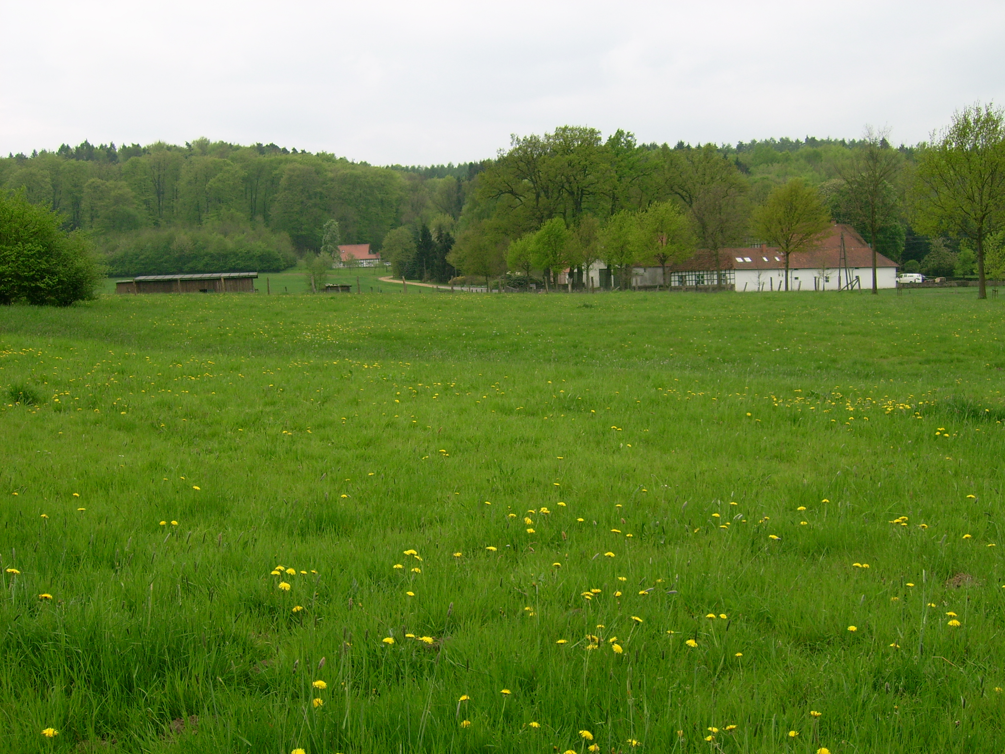 Landschaft am Butterberg in Hagen am Teutoburger Wald